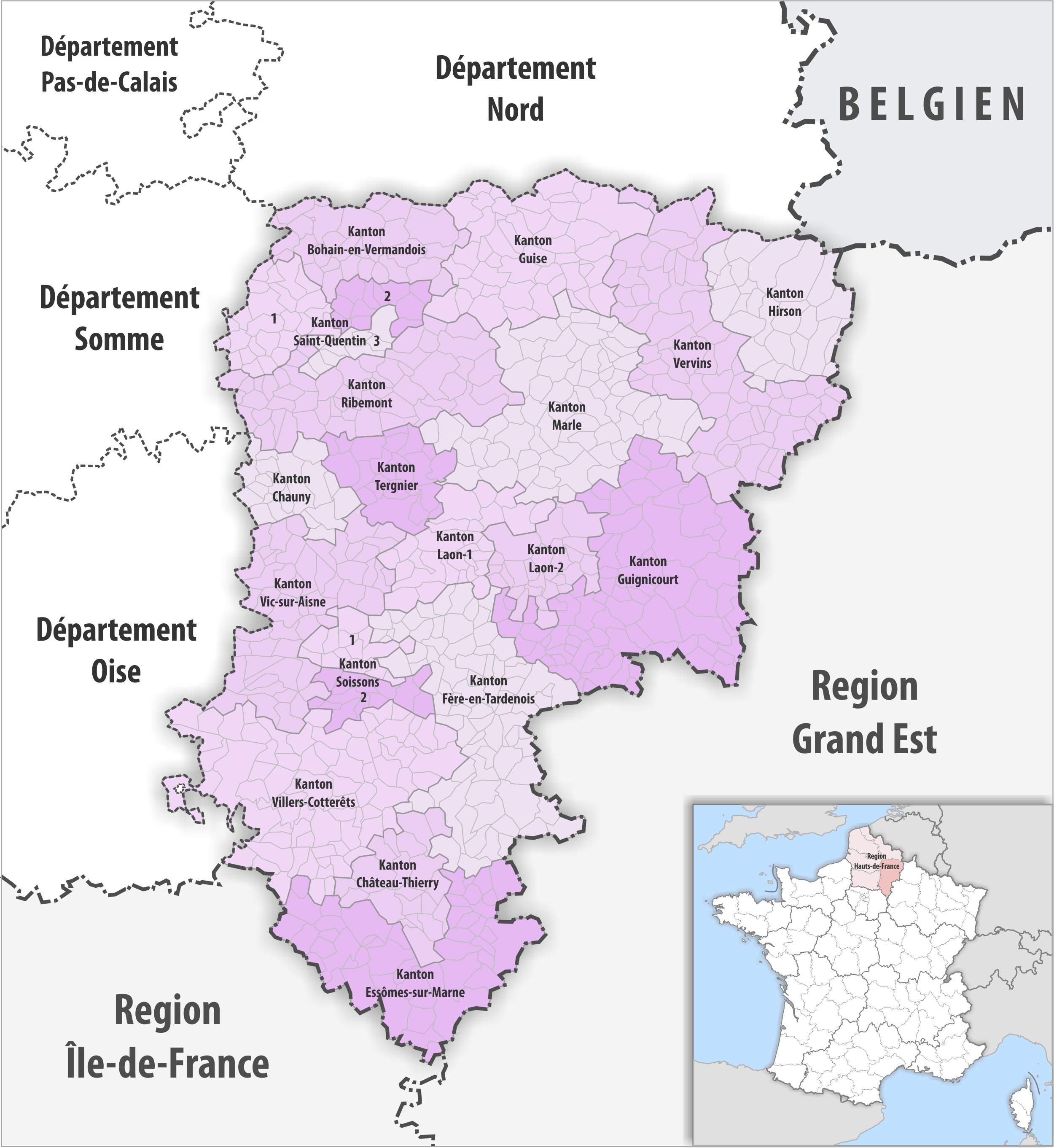 Gemeinden und Kantone im Departement Aisne